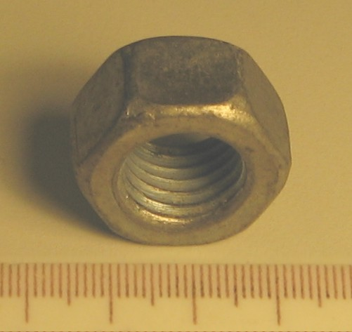 Ŝraŭbingo kun ena metreca ŝraŭbeco M16 Mi, aŭtoro de la bildo, permesas al ĉiuj uzi ĝin kun ĉi tiaj kondiĉoj